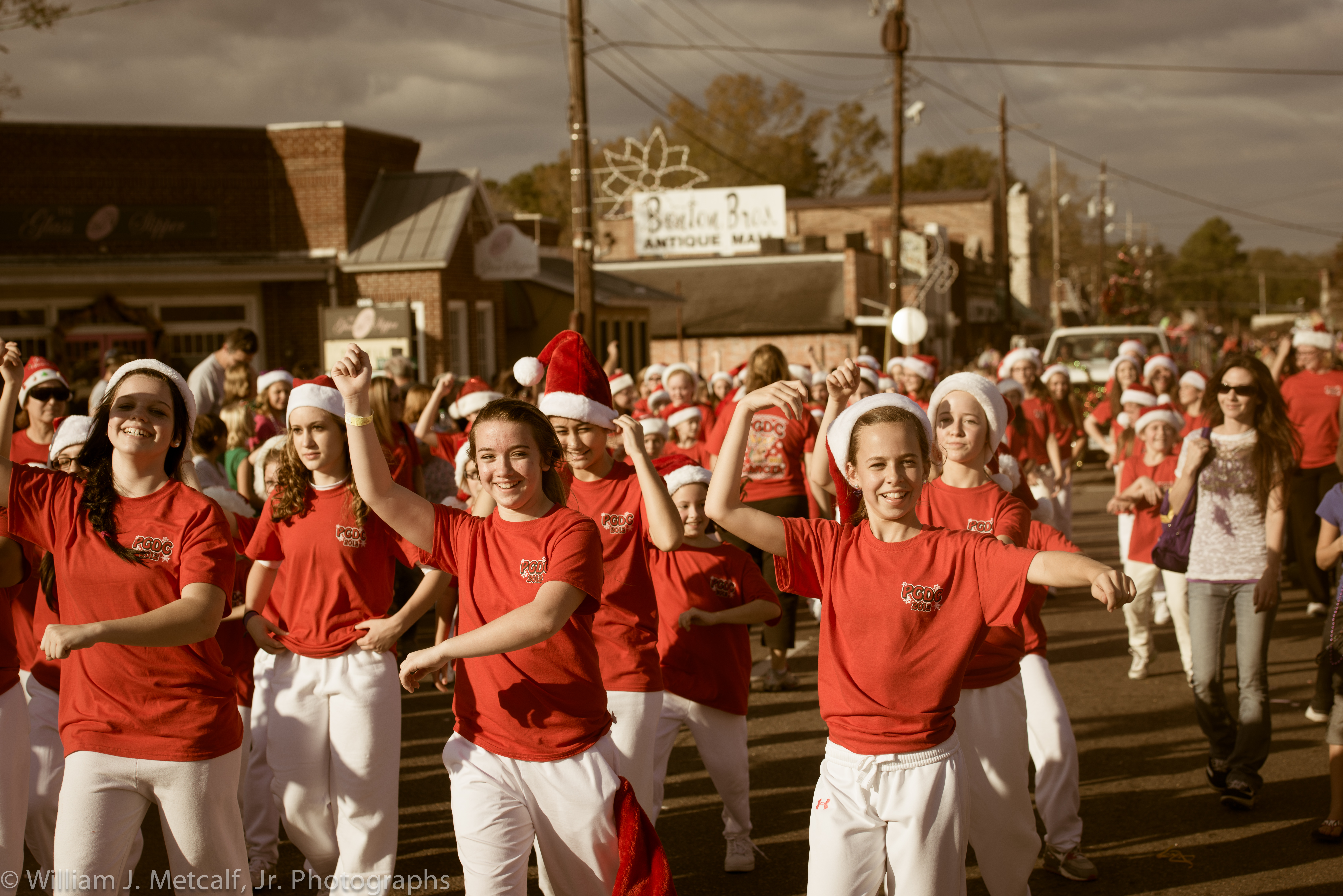 Denham Springs, Louisiana, Christmas parade.